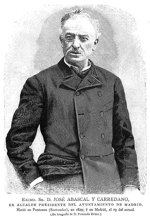 Retrato de José Abascal y Carredano, a partir de una fotografía de Fernando Debás, recogido en la revista española La Ilustración Española y Americana.